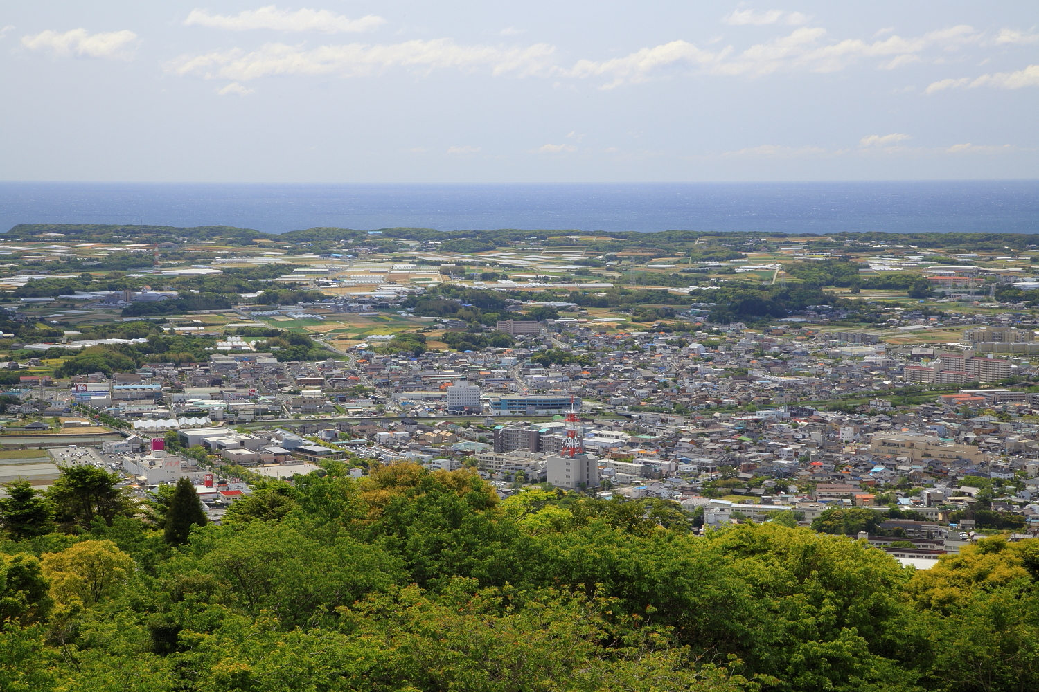 蔵王山頂から眺める田原市街地（田原市、2012年）